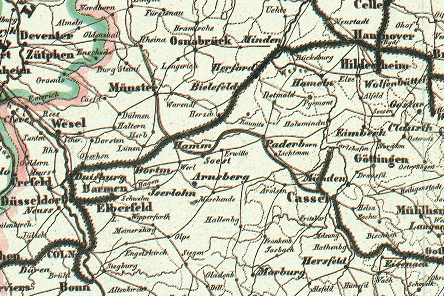 Ausschnitt Coeln-Minden aus der Bahnkarte_Deutschland_1849